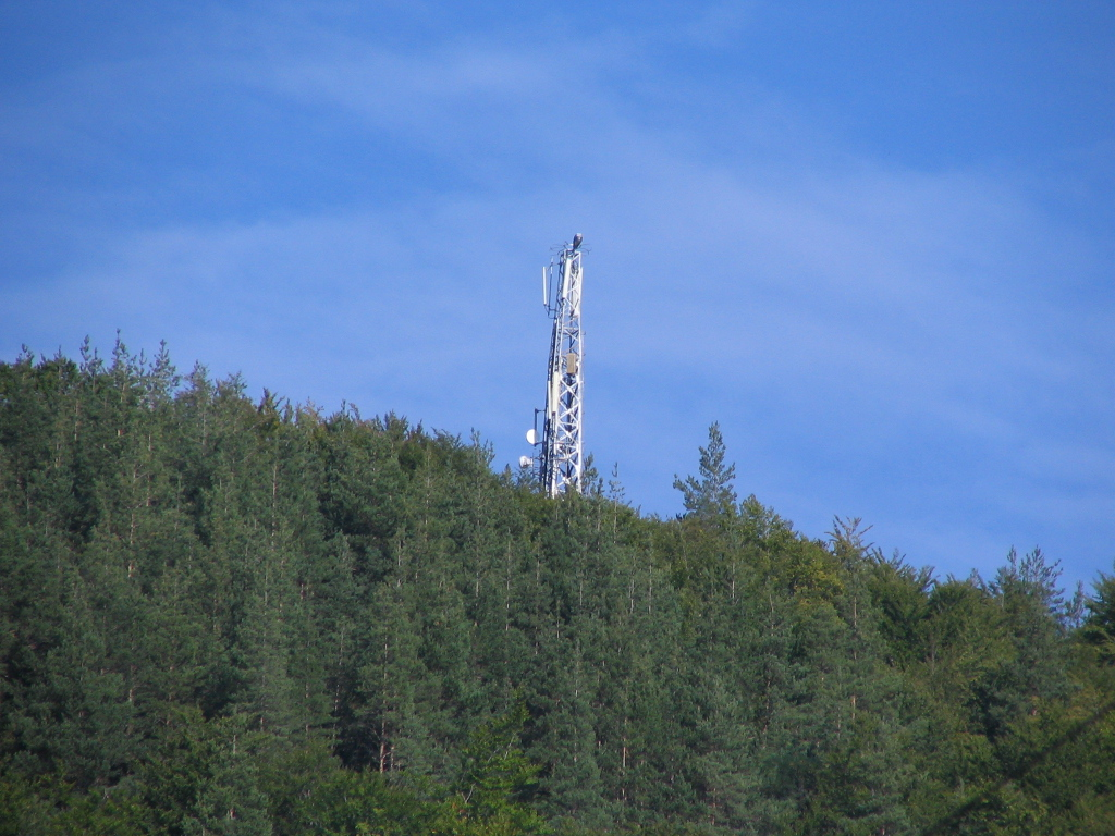 Ретранслатора на селото отдалеч.